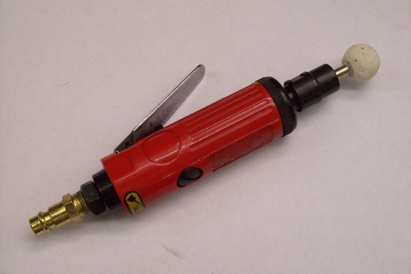 Druckluftbetriebenes Schleifgerät